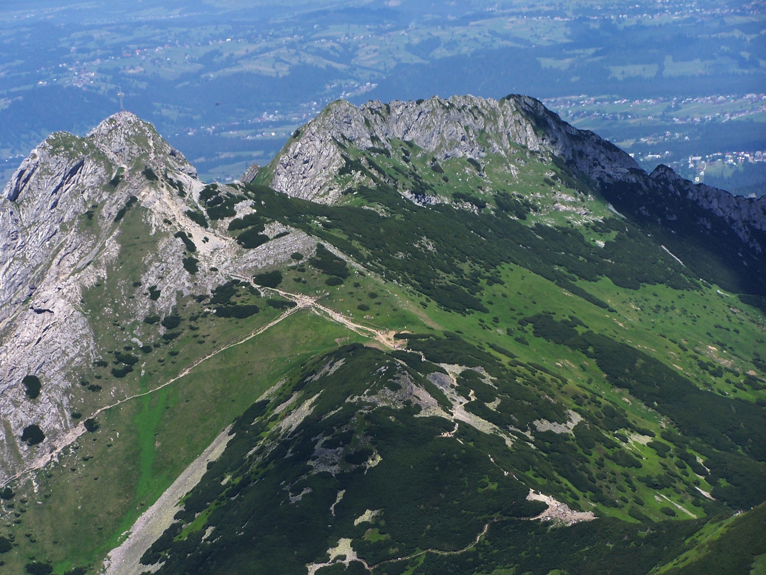 Widok z Małołączniaka